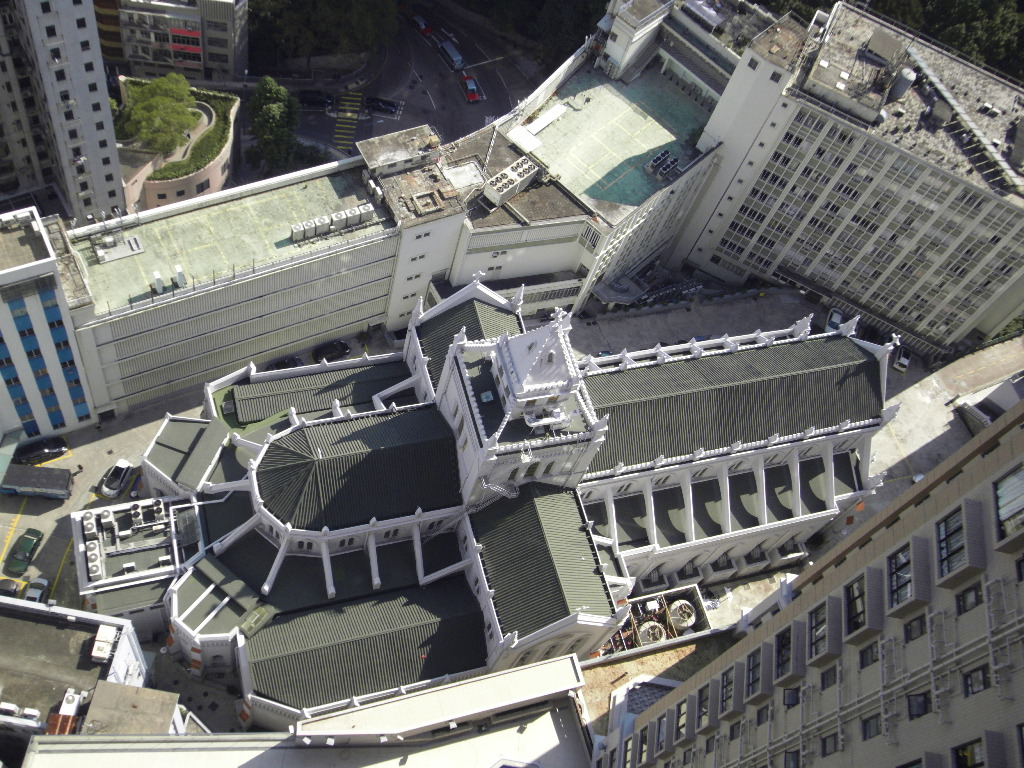 天主教座堂的屋頂是十字架形狀